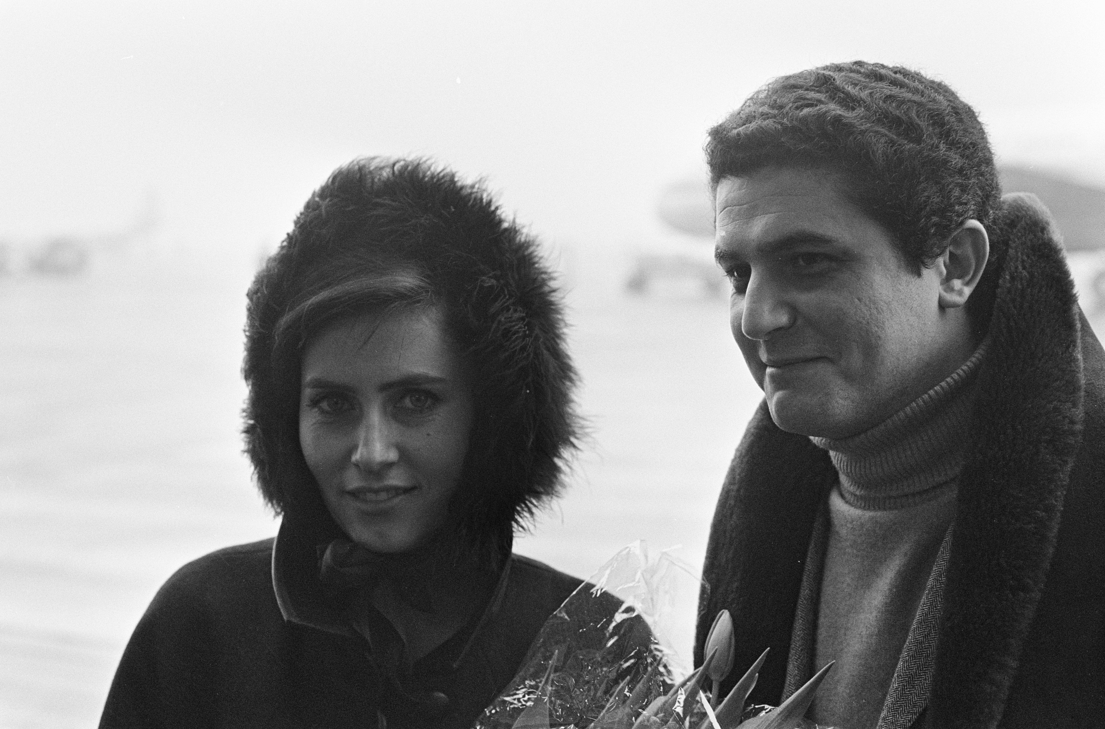 Collectie / Archief : Fotocollectie Anefo Reportage / Serie : [ onbekend ] Beschrijving : Aankomst Janine Magnan (franse actrice) en echtgenote Claude Lelouch (regisseur) op Schiphol Datum : 31 januari 1966 Locatie : Noord-Holland, Schiphol Trefwoorden : ECHTGENOTES, Regisseurs, aankomsten, acteurs, toneelspelers Persoonsnaam : Janine Magnan Fotograaf : Evers, Joost / Anefo Auteursrechthebbende : Nationaal Archief Materiaalsoort : Negatief (zwart/wit) Nummer archiefinventaris : bekijk toegang 2.24.01.05 Bestanddeelnummer : 918-7329